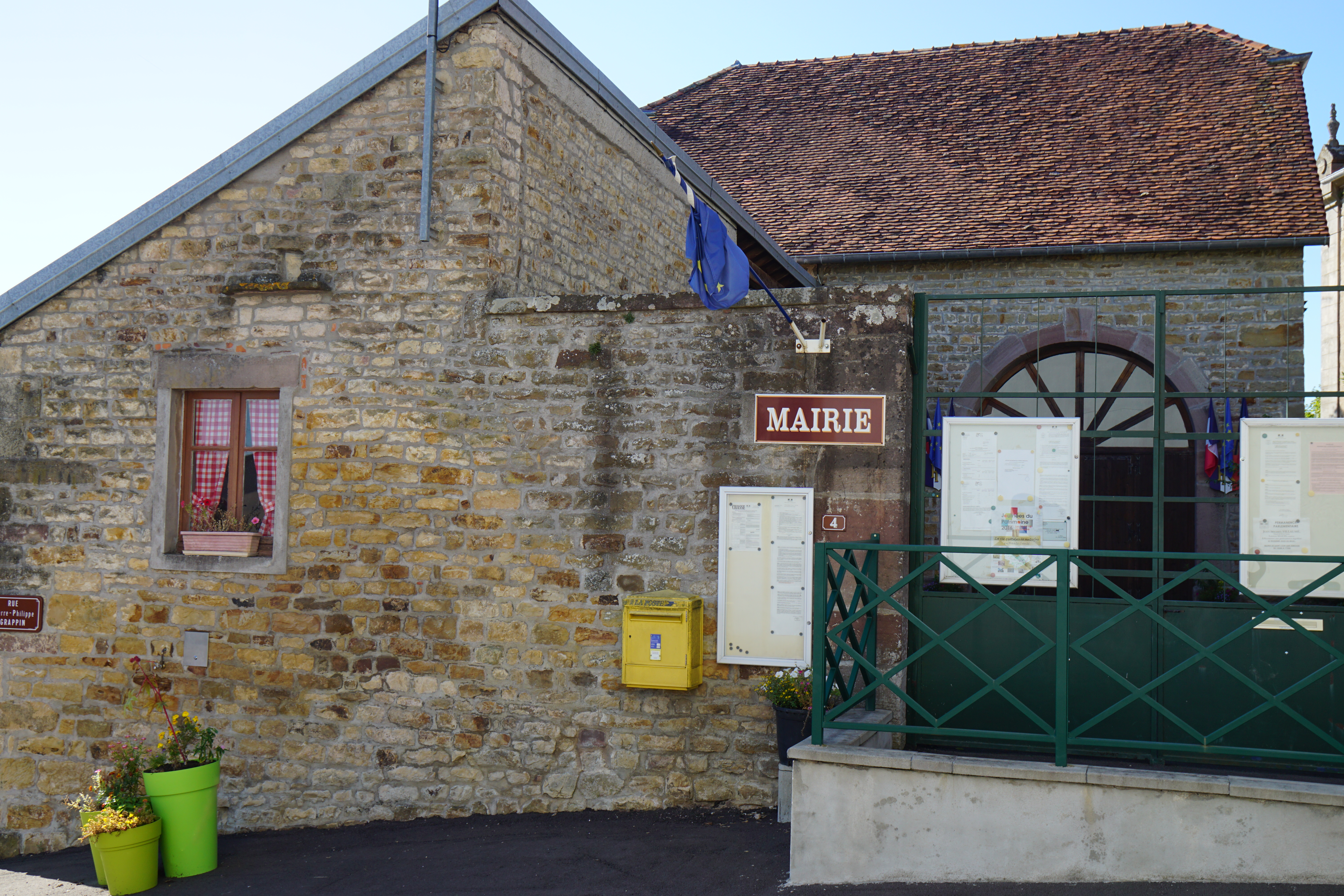 La mairie de Ainvelle en Haute-Saône.